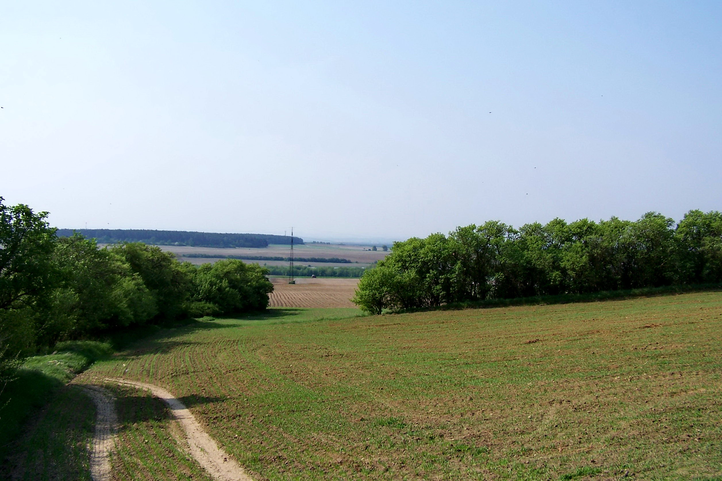 tará Lysá, pohled od Hraštice k Hrabanovu.